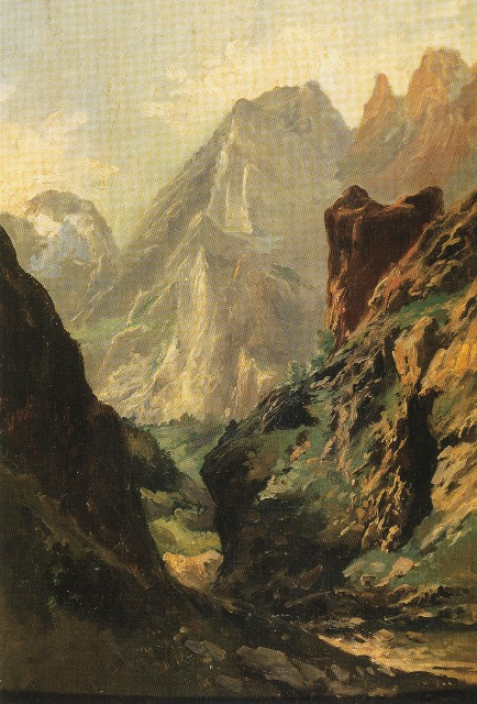 Boceto para el lienzo de Carlos de Haes, La Canal de Mancorbo en los picos de Europa, 33 cm x 23 cm, 1874, colección particular.